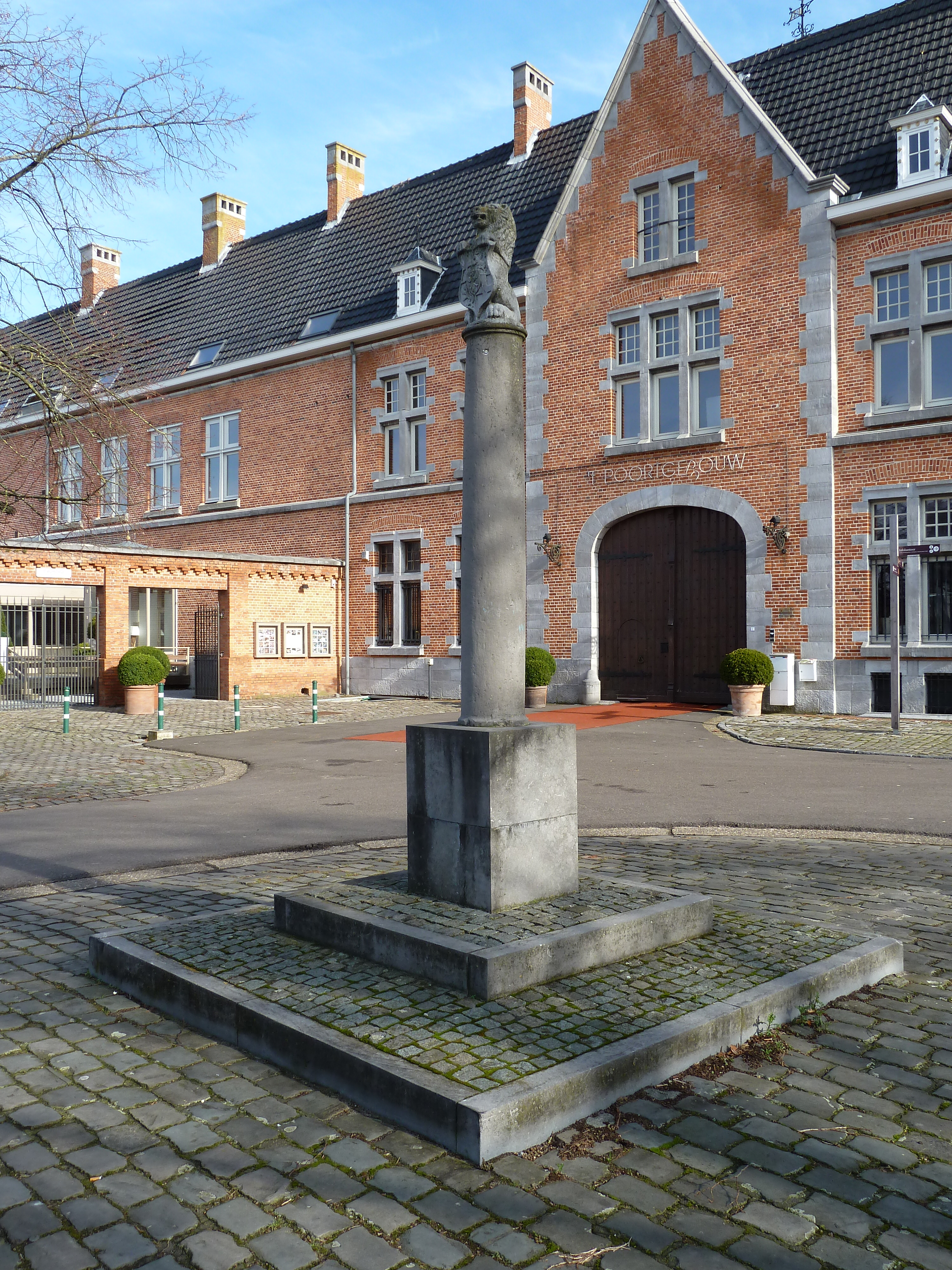 Schandpaal op de Groenplaats in Oud-Rekem, Limburg, België